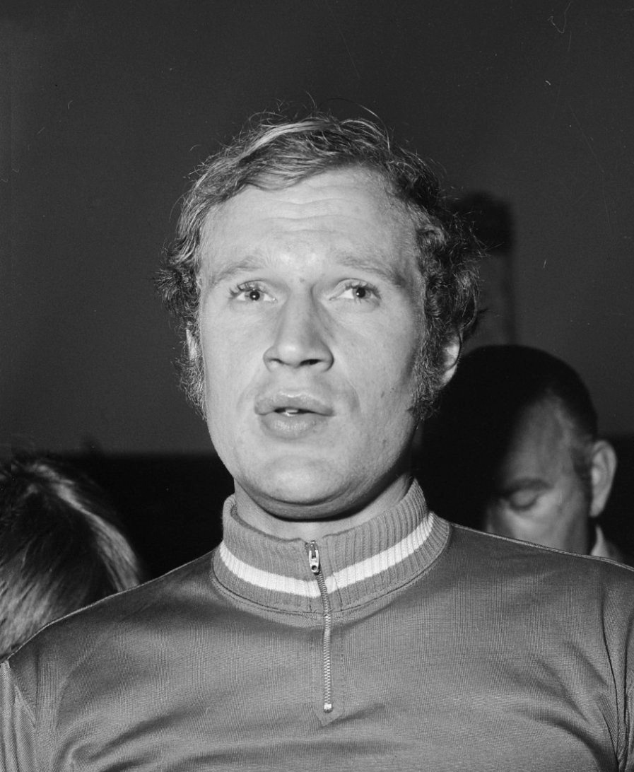 Kampioenschap van Nederland, wielrennen amateurs op de baan Klaas Balk (kop)